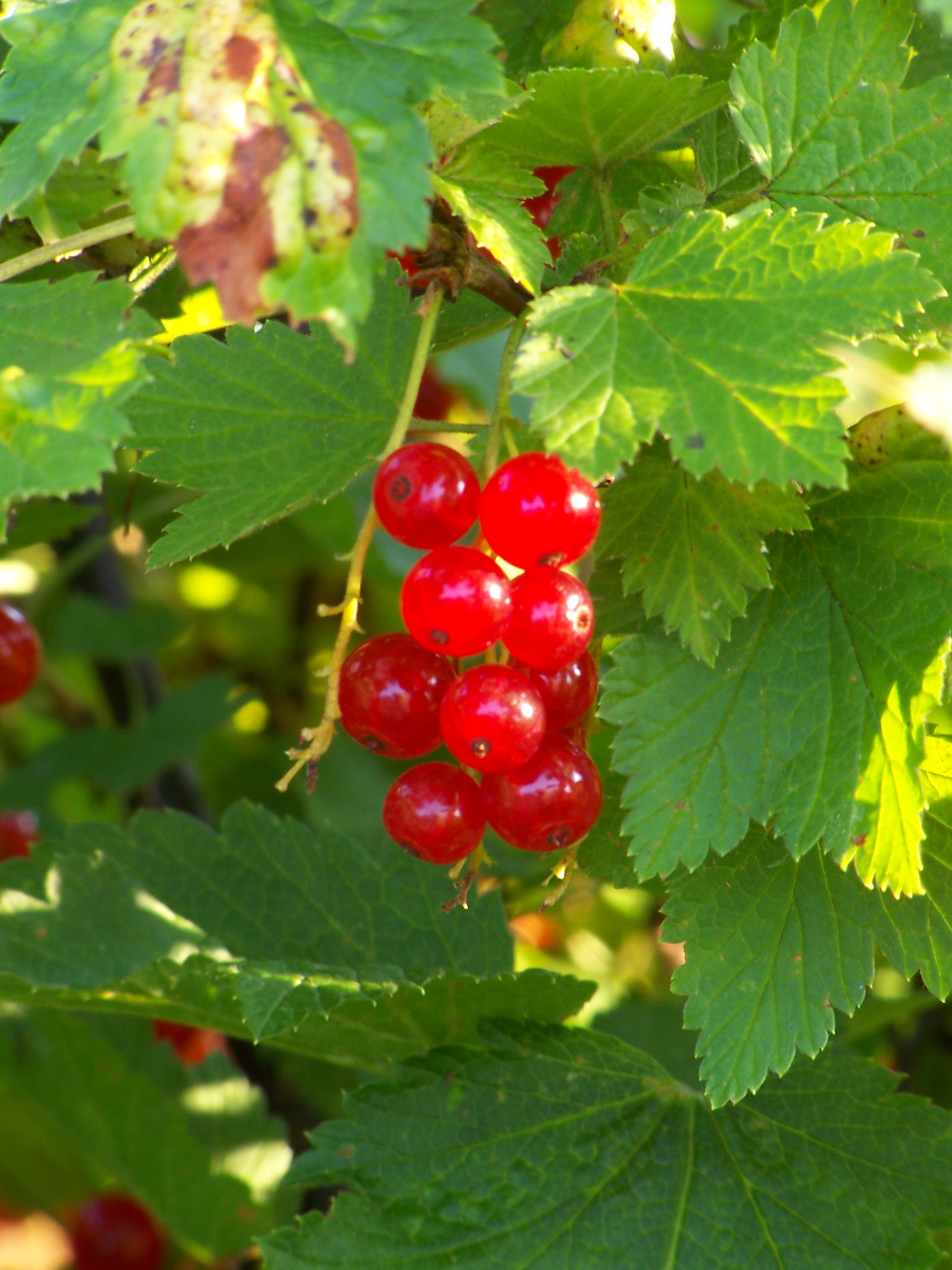 Owoce czerwonej porzeczki.